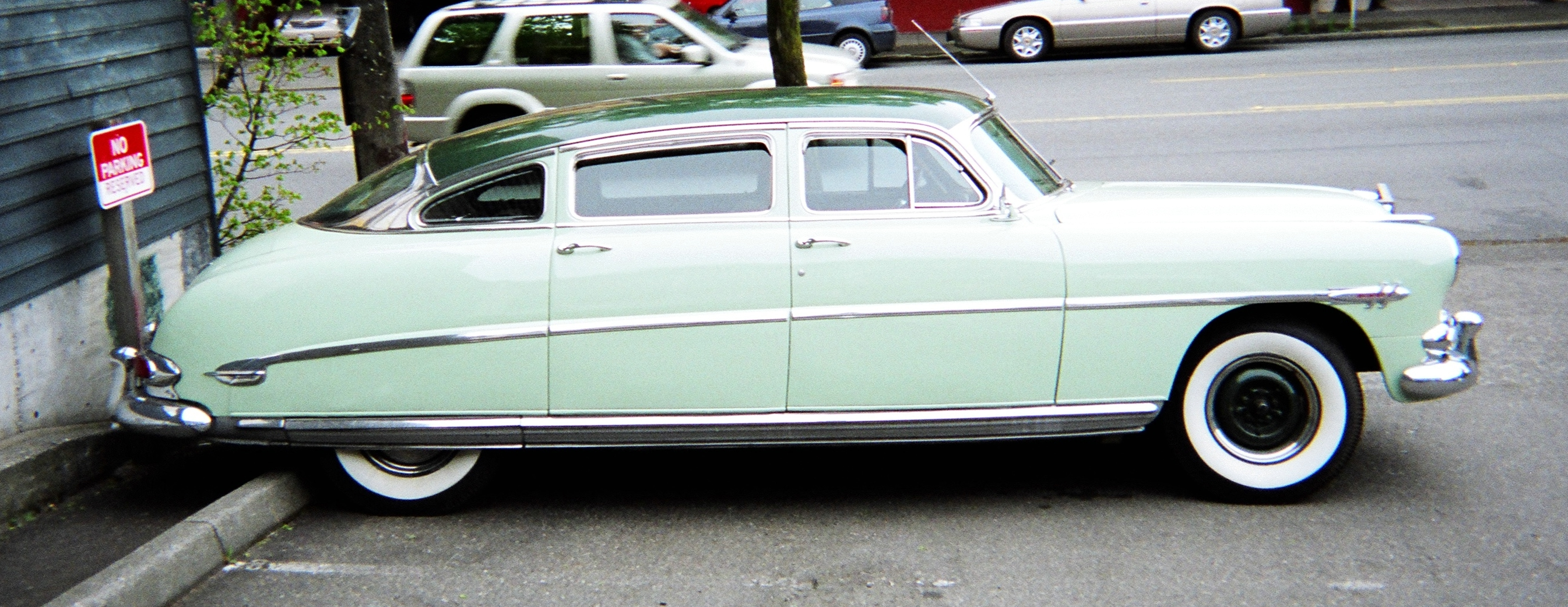 Mi fotis tion la 25-an aŭ 26-an de aprilo 2007 en Seatlo. Mi cedas ĉian pretendon pri kopirajto.